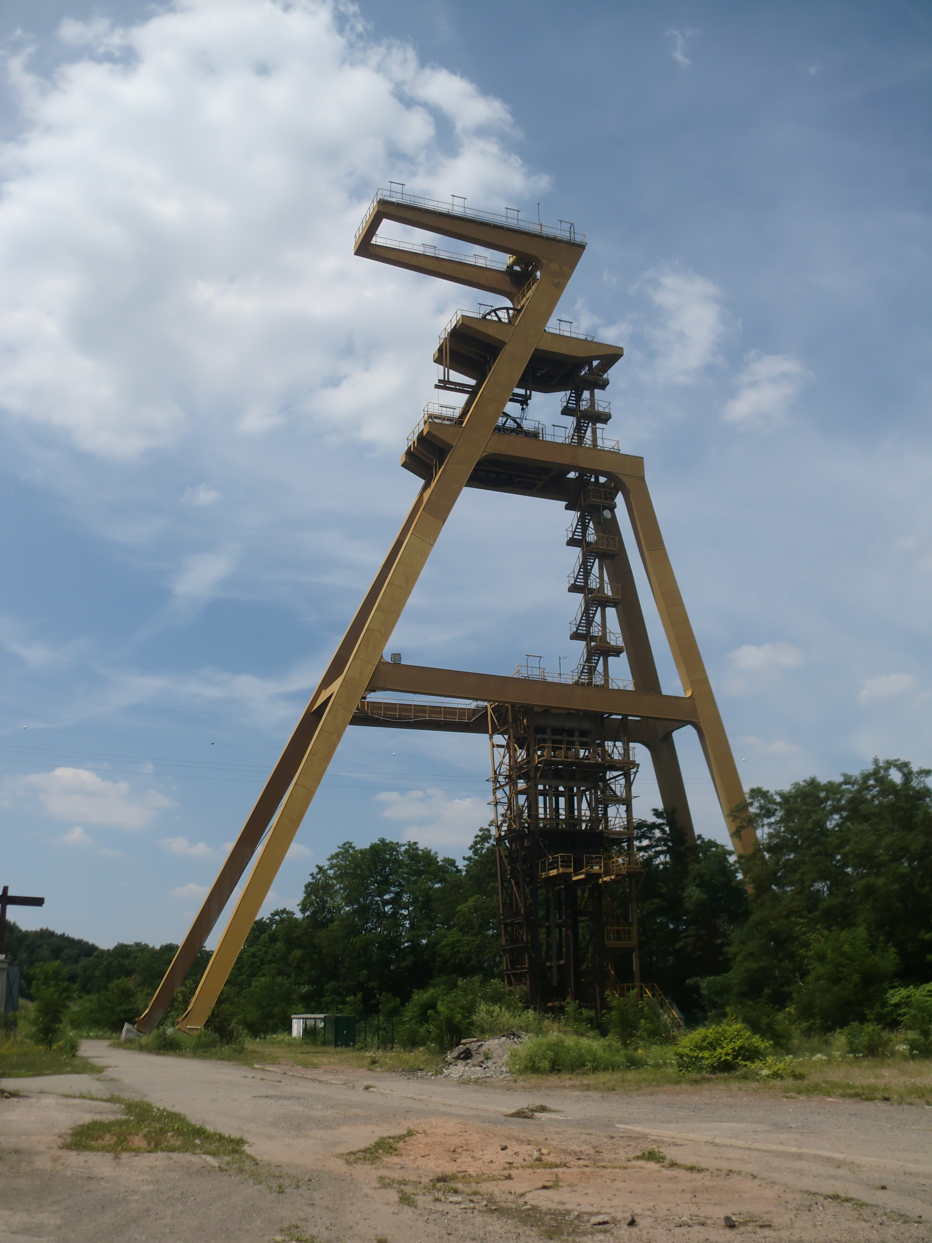 Puits Cuvelette Nord (Mine de charbon de Moselle, France).